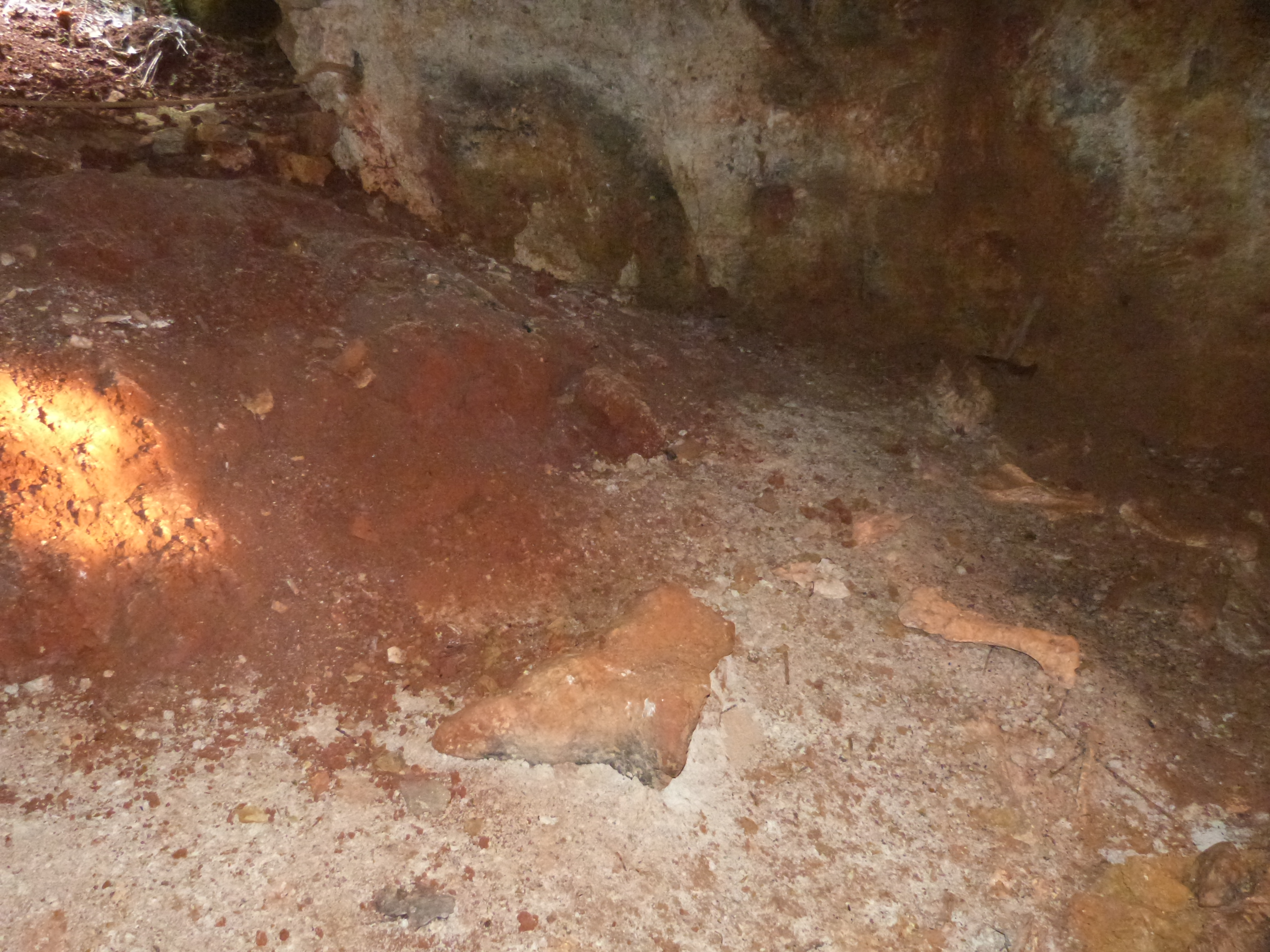 Phosphatière du Cloup d'Aural (Inscrit) .